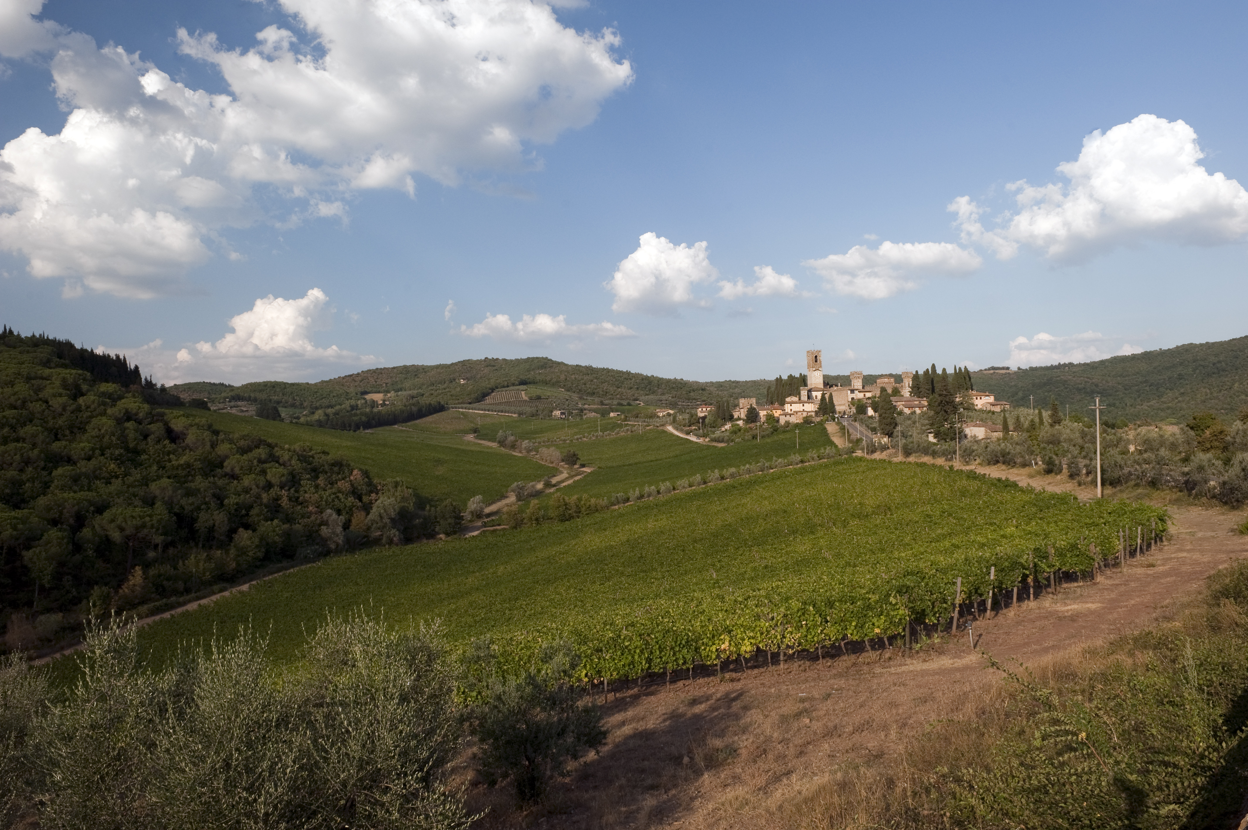 Panorama di Badia a Passignano